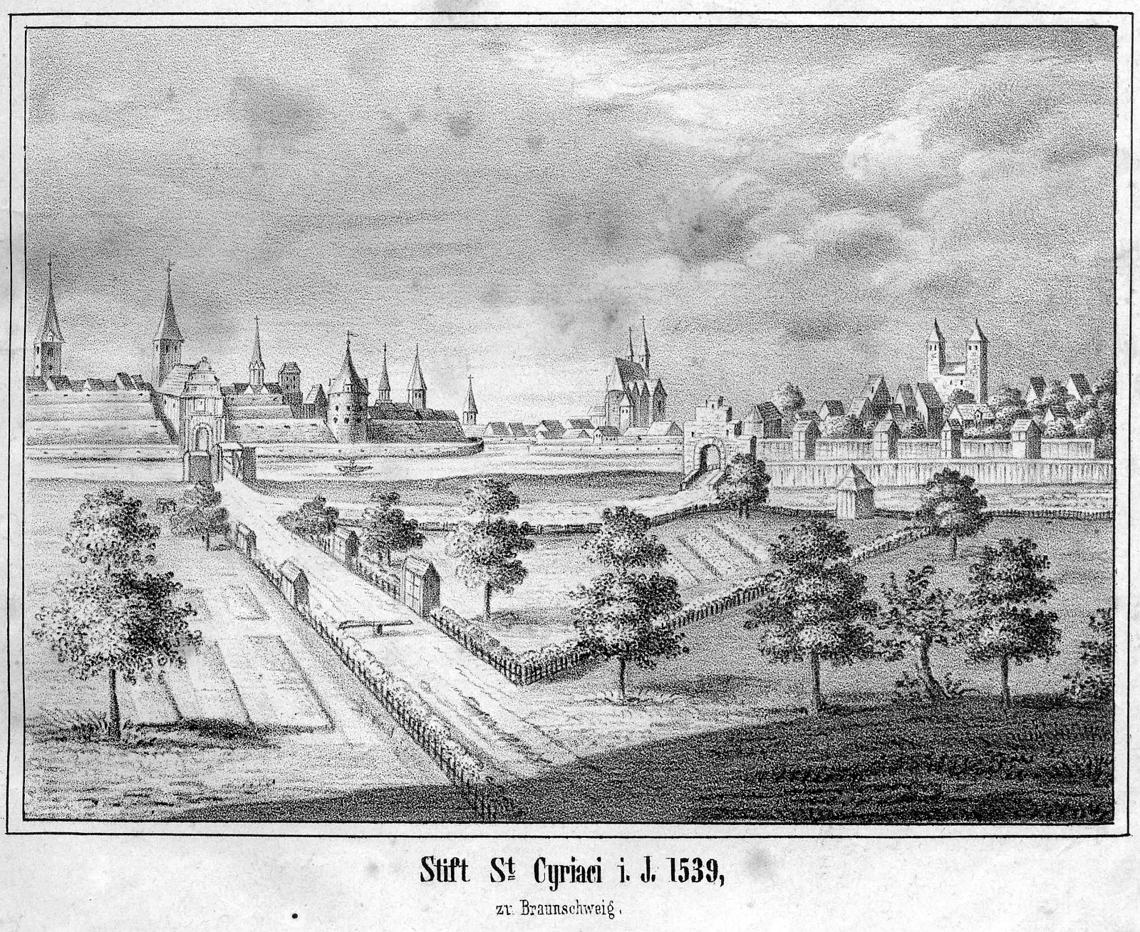 Braunschweig: Stich des St. Cyriakus Stiftes aus dem Jahre 1539.